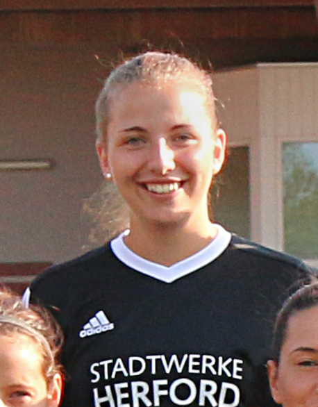 Herforder SV Borussia Friedenstal Team 2014/2015